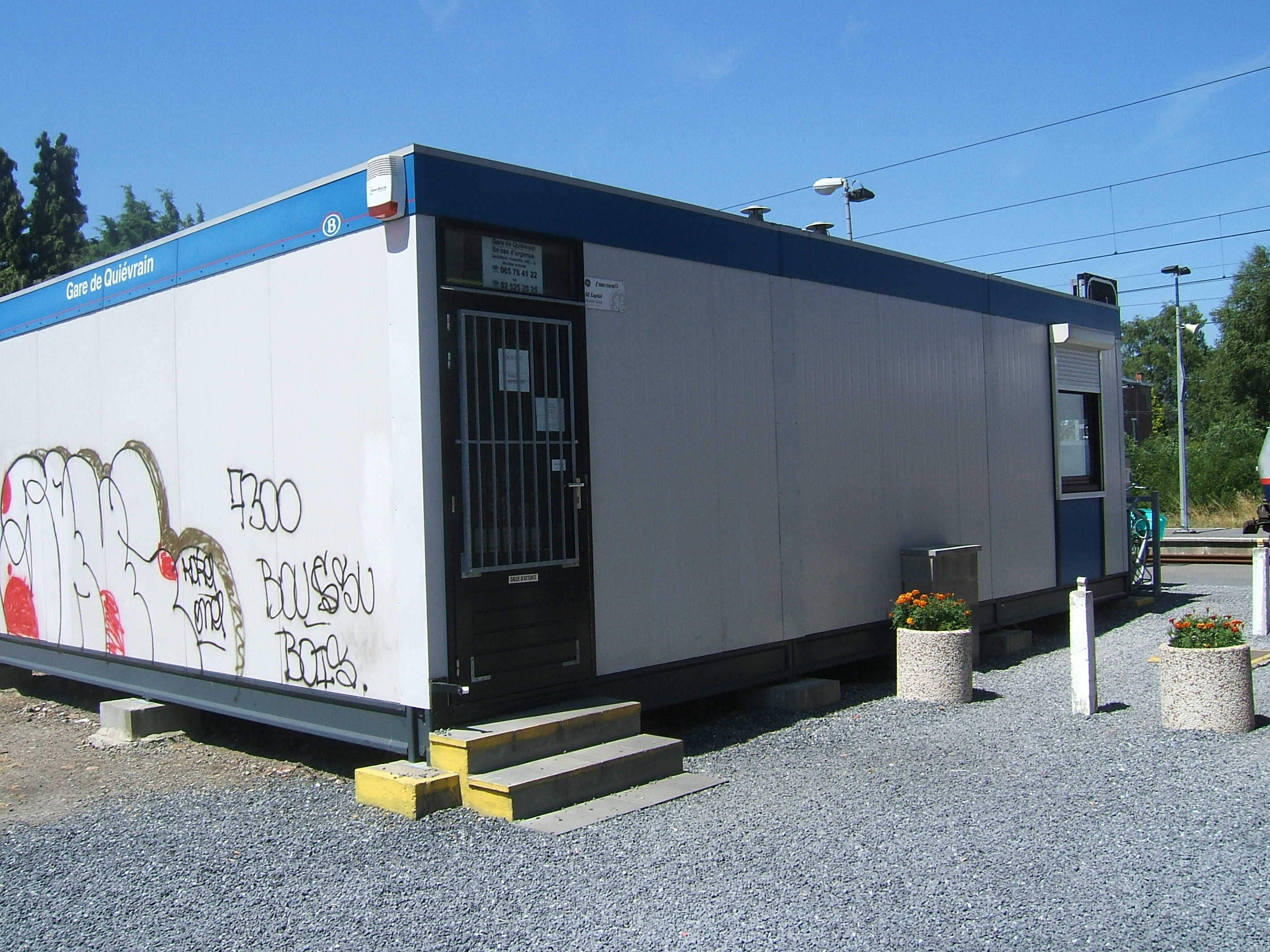 Depuis la fermeture du bâtiment voyageurs (vétuste), le guichet est abrité dans un mobile-home.